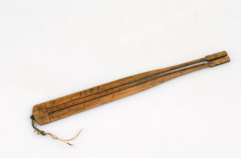 Tokkelinstrument. Mondharp van bamboe